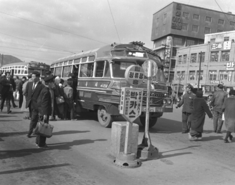 1962년 2월 버스와 버스정류장의 모습이다.